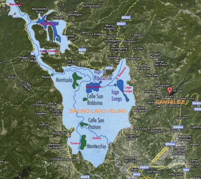 Mappa di estensione dell'antico lago velino e cantalice